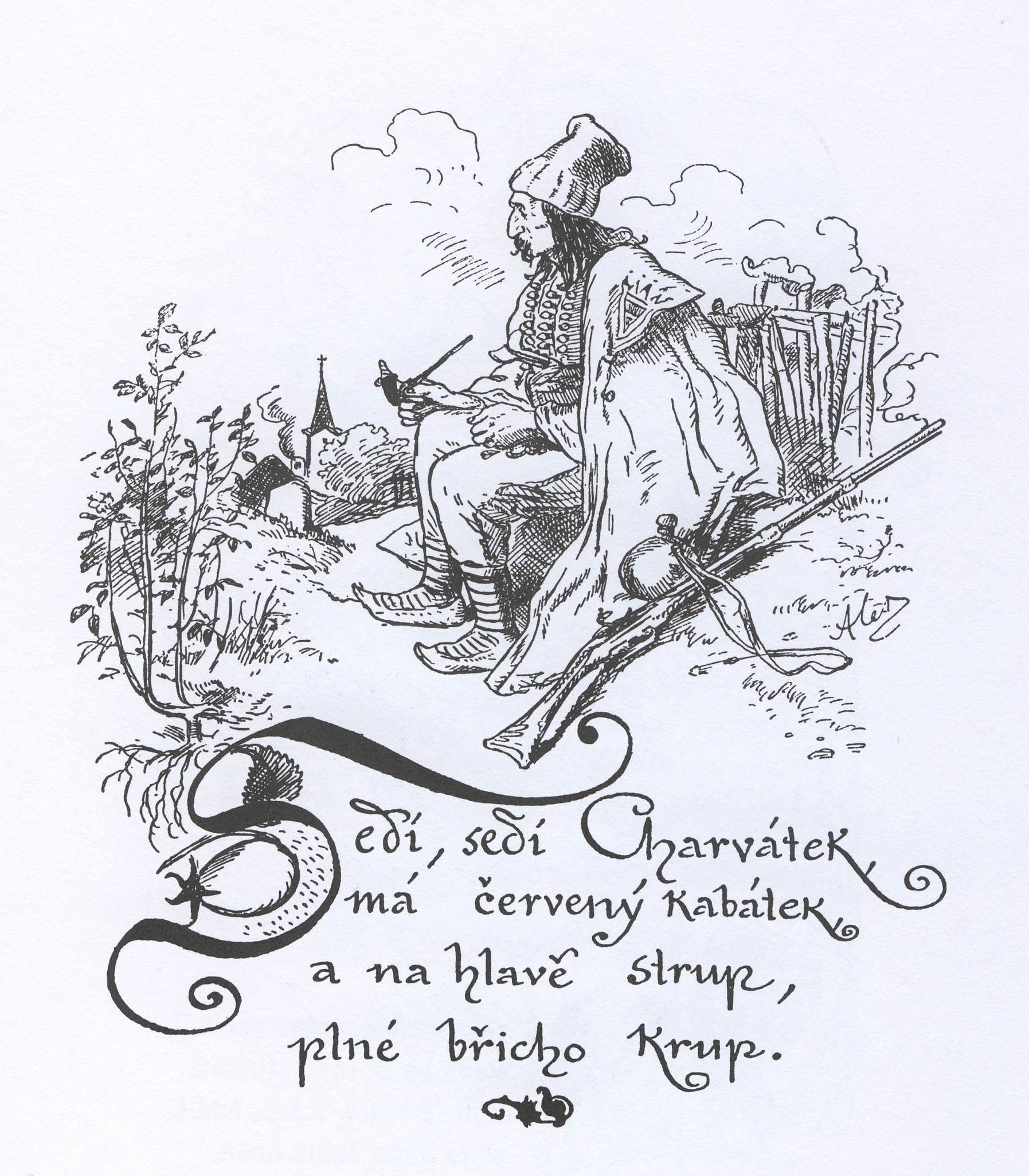 Mikoláš Aleš: Špalíček národních písní a říkadel